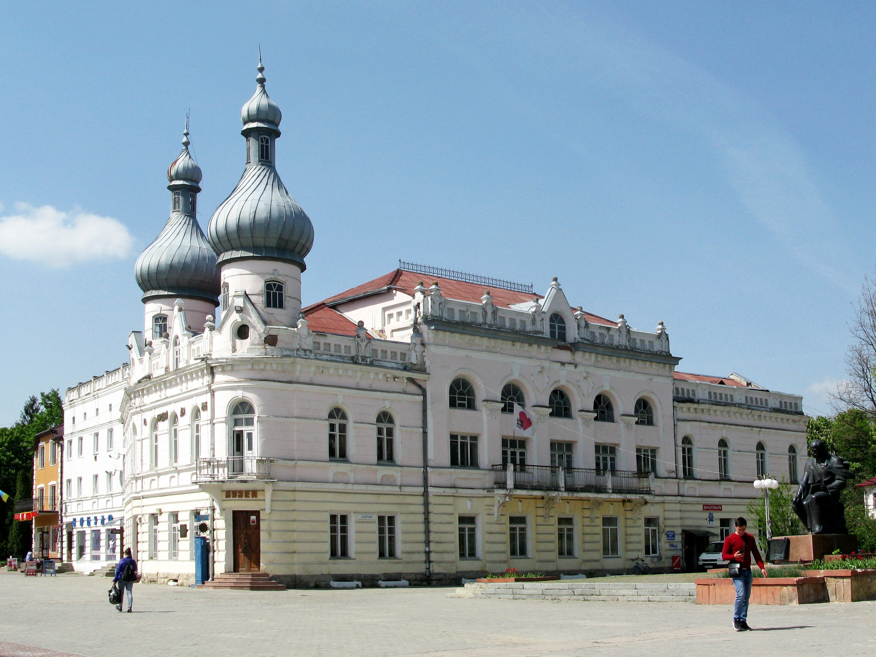 Народний будинок (мур.), м. Борщів, вул. Шевченка,2